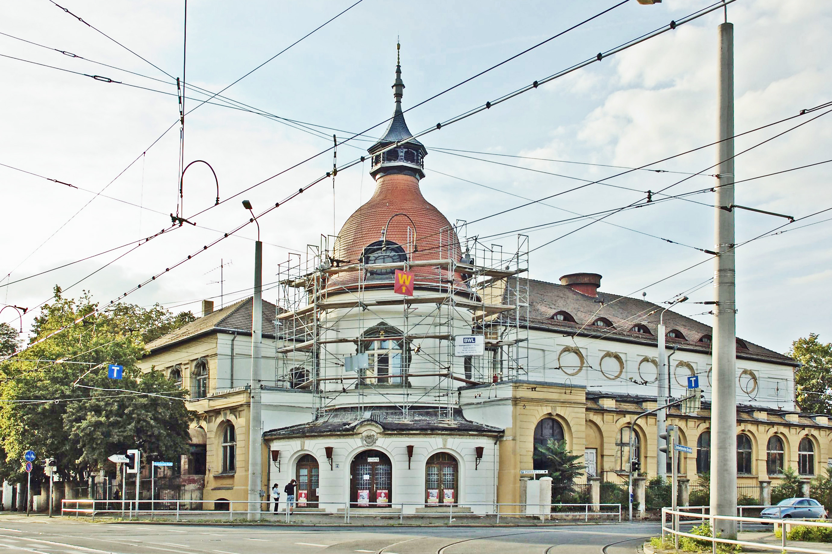 Der Felsenkeller in Leipzig-Lindenau, Karl-Heine-Straße 32